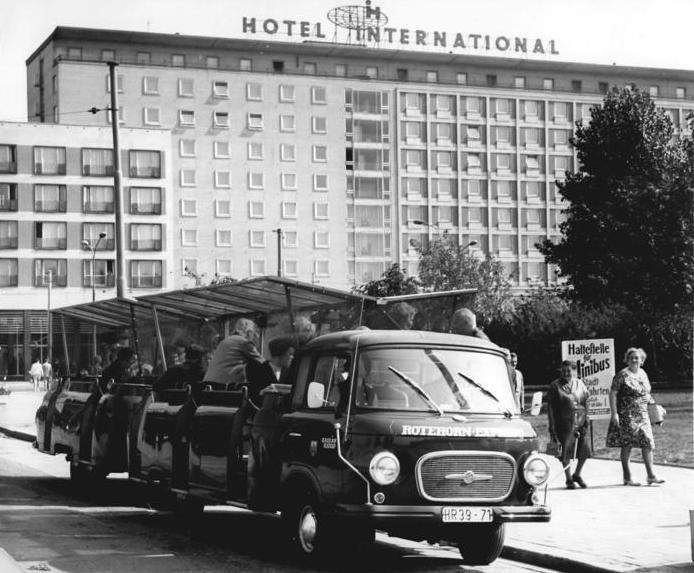 Magdeburg, Minibus Zentralbild Ritter 17.10.1969 Magdeburg: Beliebt bei Einwohnern und Gästen sind diese hübschen und bequemen Minibusse. Seit einem Jahr fährt der erste, seit einem halben Jahr der zweite Bus bei Stadtrundfahrten und im Kulturpark Rotahorn. Die Spezialfahrzeuge, entstanden auf Initiative der Autoreparaturbetriebe von Magdeburg-Süd, haben inzwischen 36000 Gäste befördert.